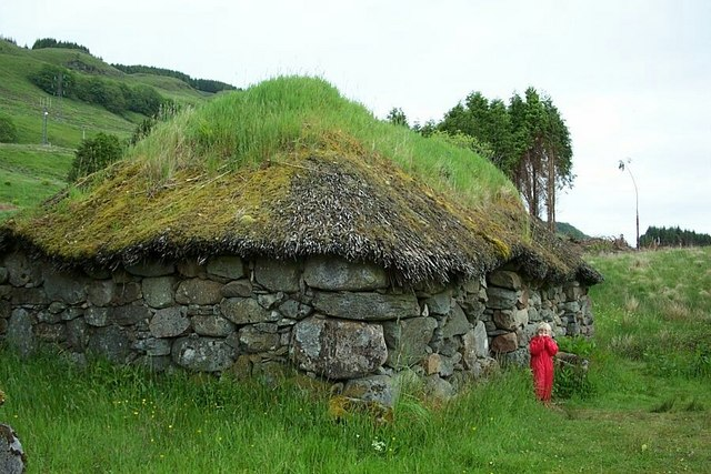 Auchindrain Folk Museum, Argyll and Bute